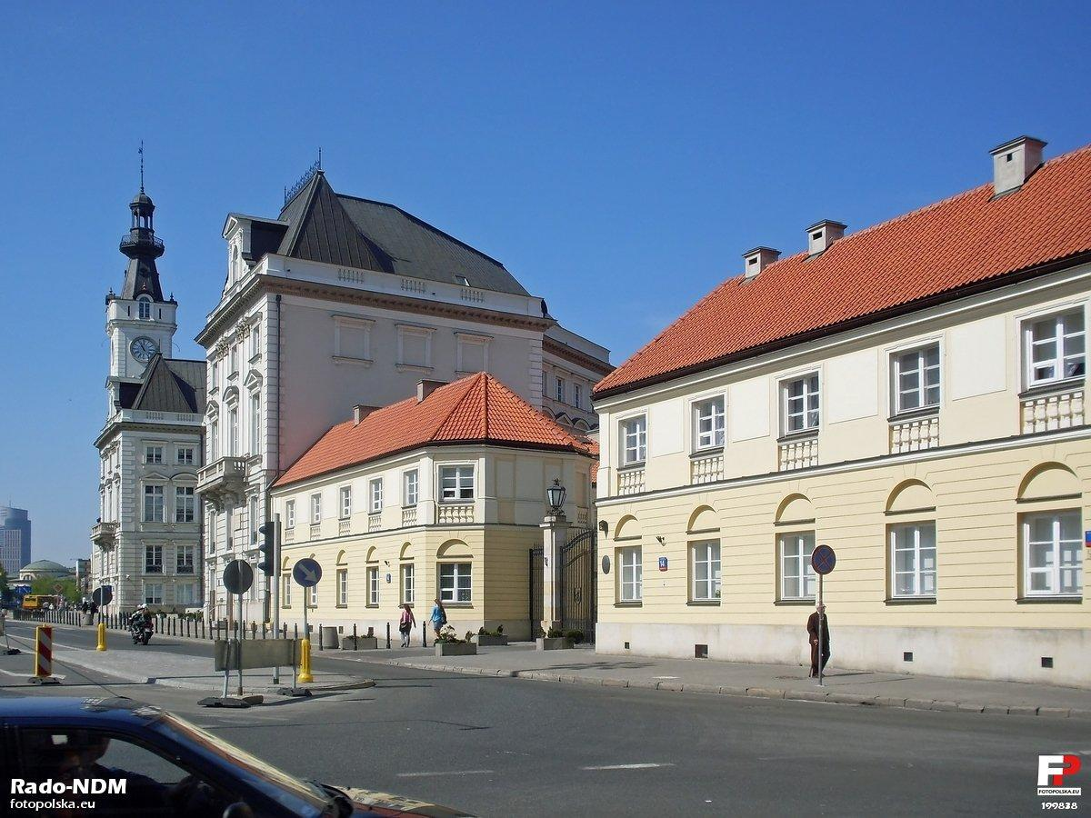 Pałac Blanka i Pałac Jabłonowskich